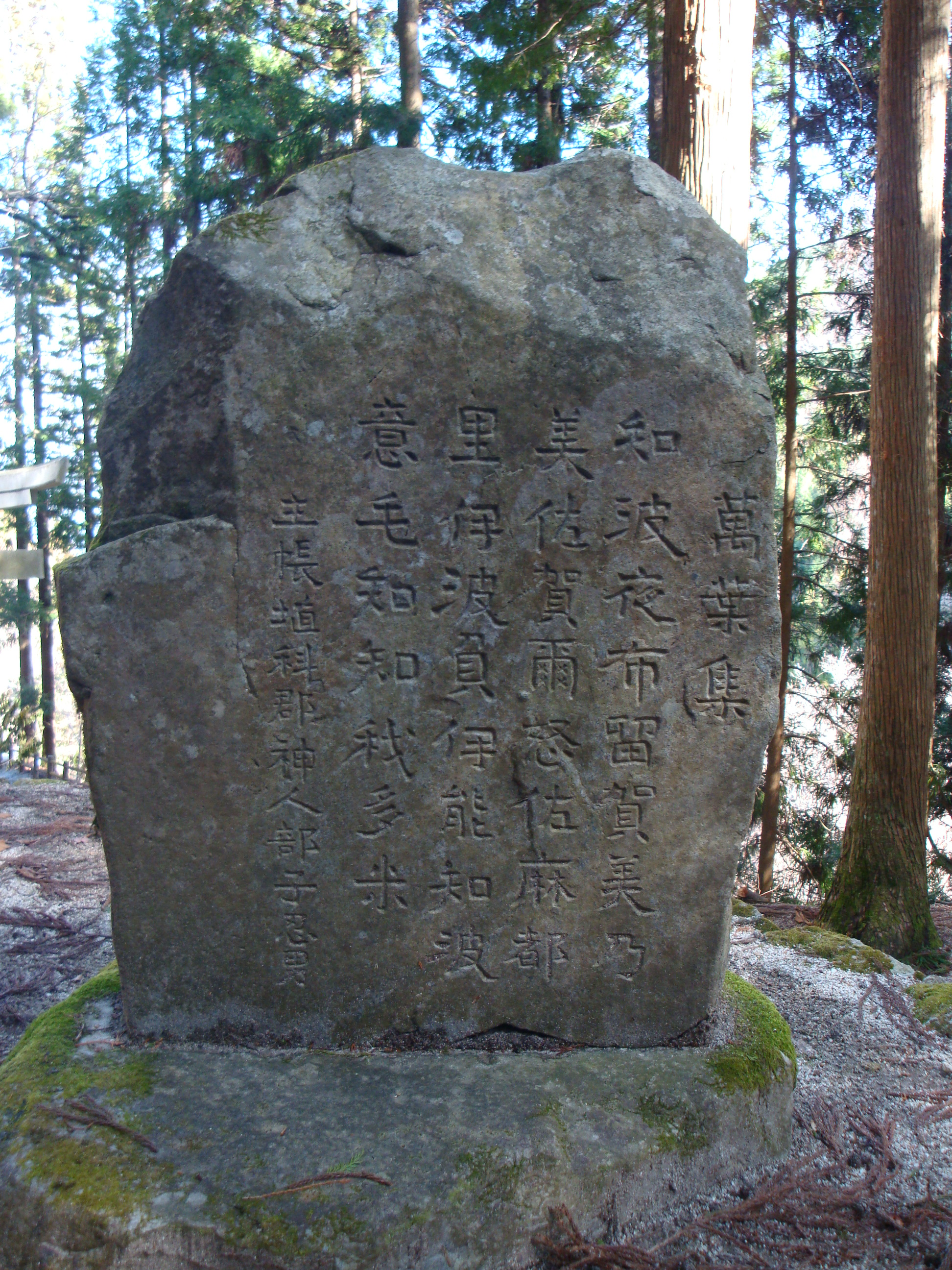 防人 神入部子忍男の和歌